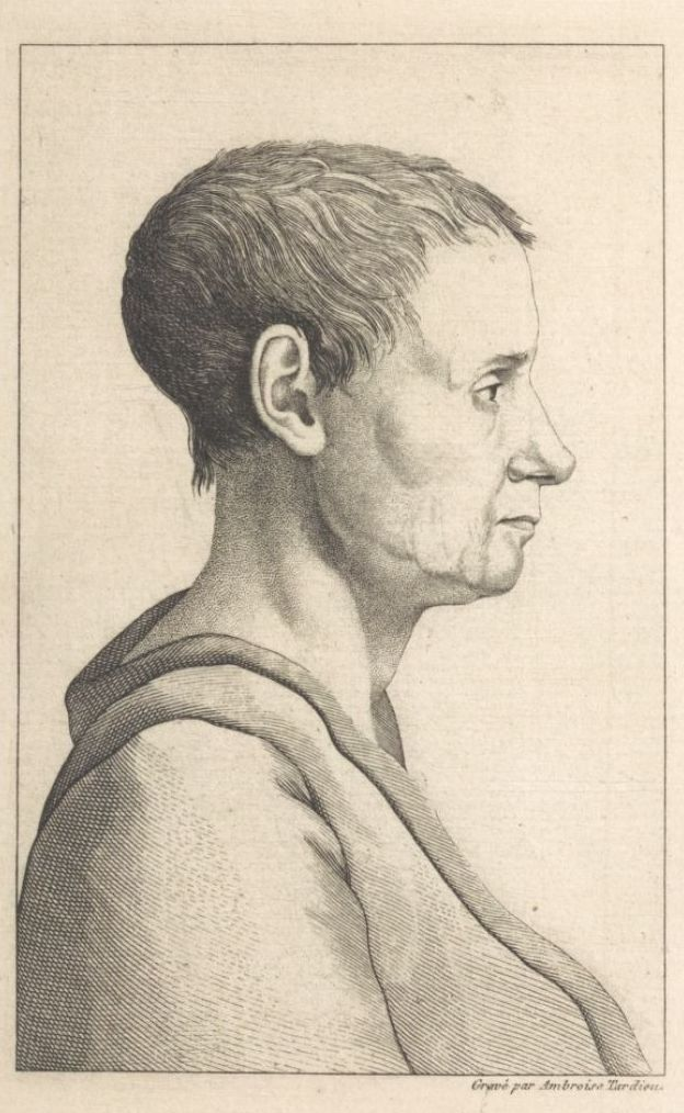 Théroigne de Méricourt à la Salpêtrière en 1816. Gravure d'Ambroise Tardieu d'après le portrait dessiné par Gabriel. Planche publiée dans l'ouvrage de Jean-Étienne Esquirol, Les Maladies mentales (1836) [1], puis reproduite dans l'ouvrage de Marcellin Pellet, Étude historique et biographique sur Théroigne de Méricourt : avec deux portraits et un fac-similé d'autographe, Paris, Maison Quantin, 1886, 126 p. [2].